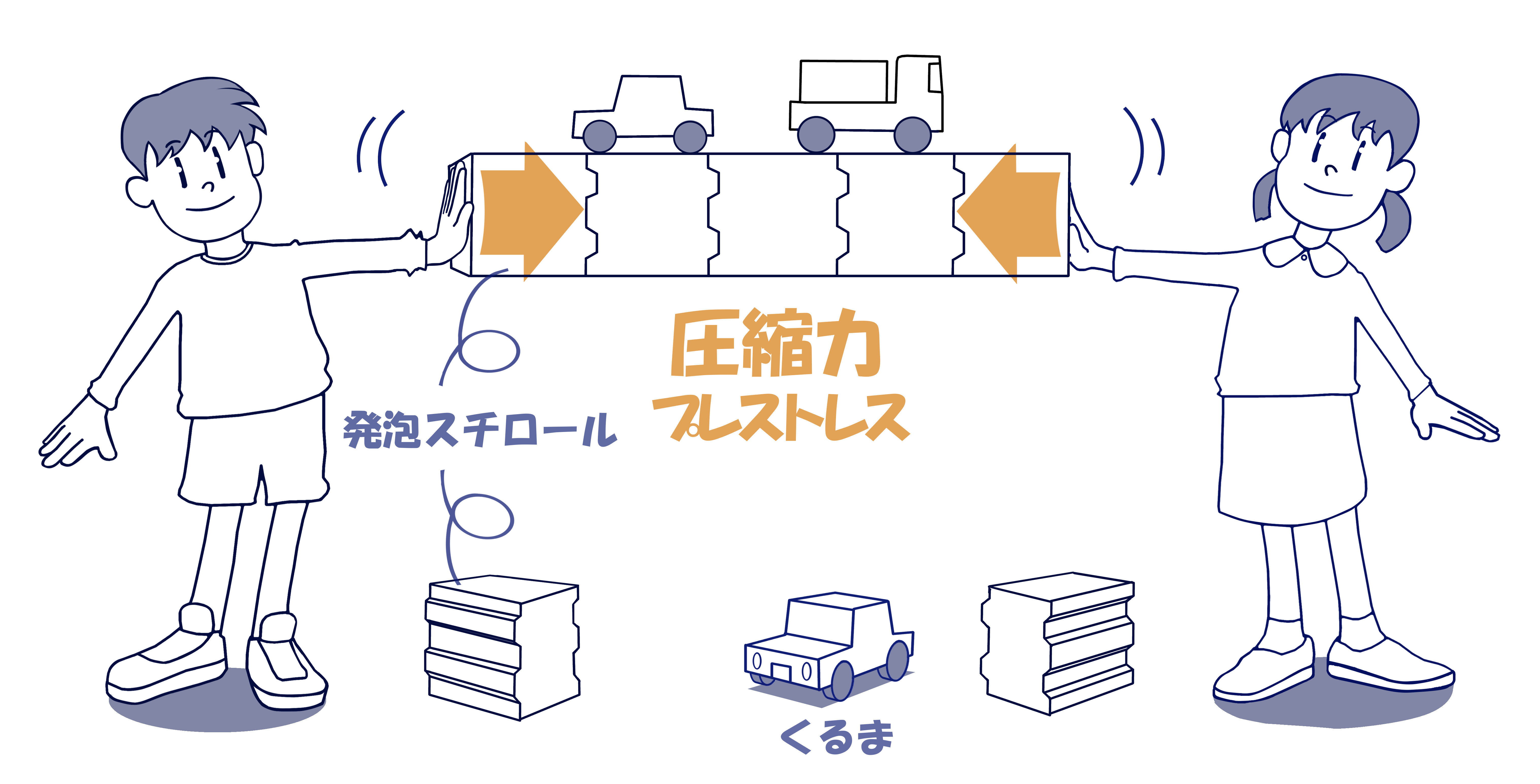 プレキャストセグメント工法の原理をイラスト化したもの。図は『PC技術規準シリーズ 外ケーブル構造・プレキャストセグメント工法 設計施工規準』(ISBN 4-7655-2486-8 C3051)を元にイラスト化した。